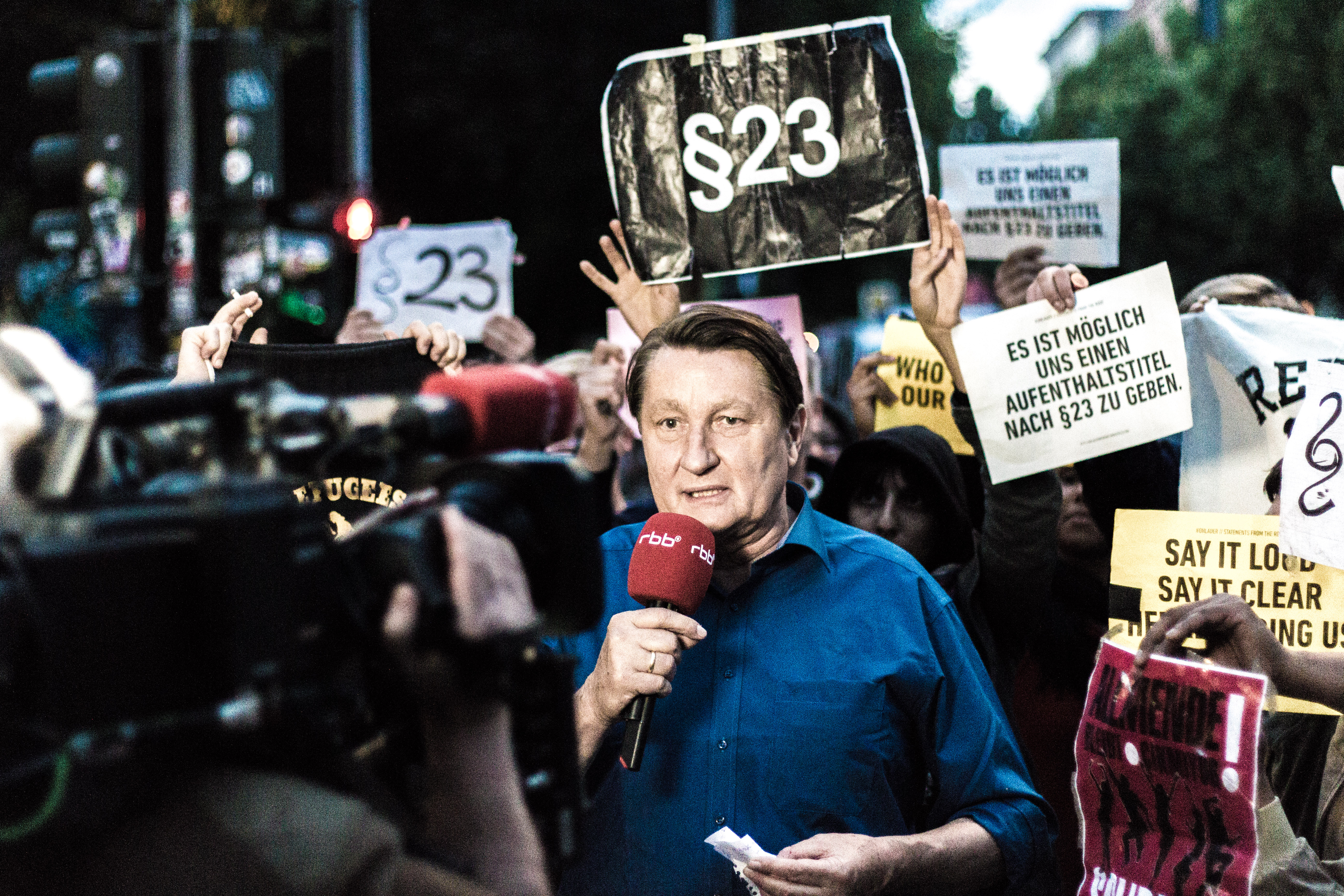 Ulli Zelle live in der Abendschau Spätausgabe (aka rbb aktuell) am 1. Juli 2014 in der Ohlauer Straße